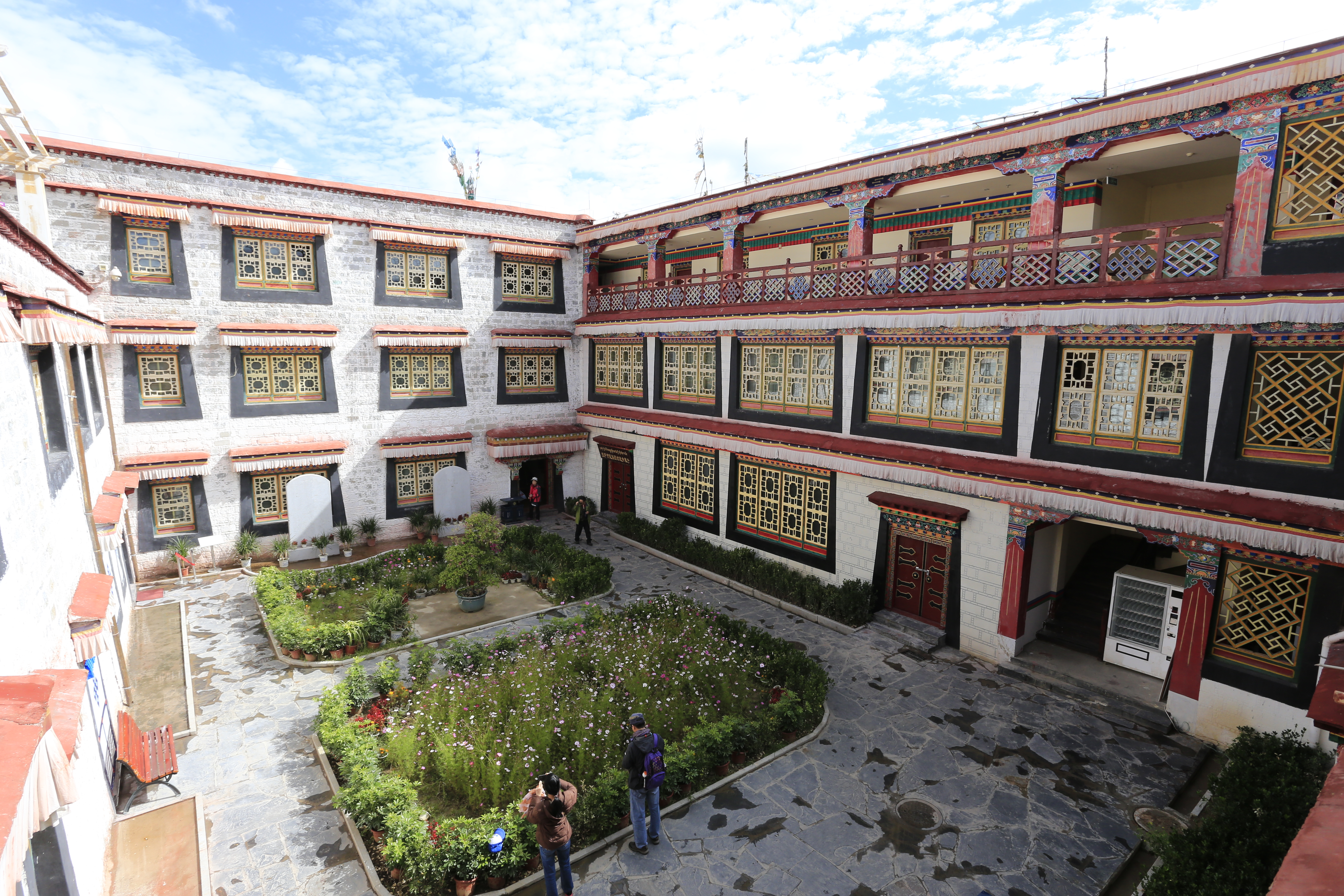 冲赛康—— 东院